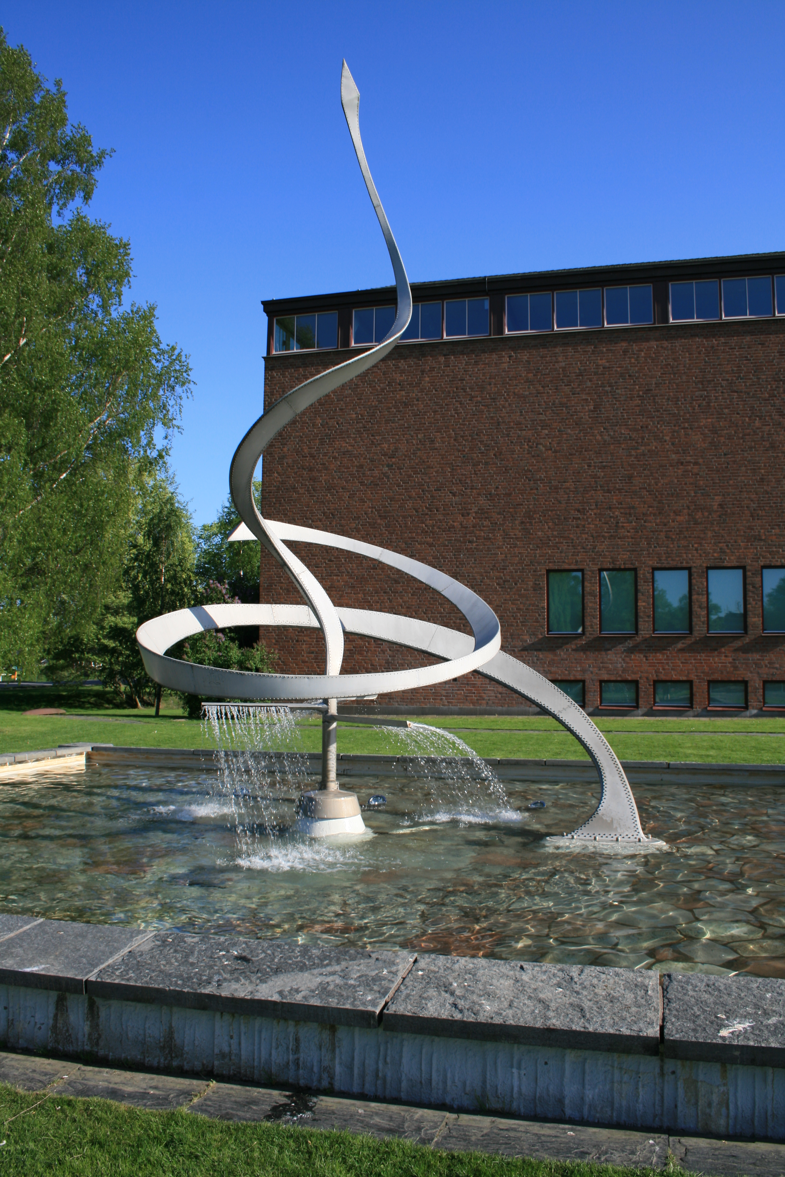 Spiral åtbörd, konstverk utanför Norrköpings konstmuseum